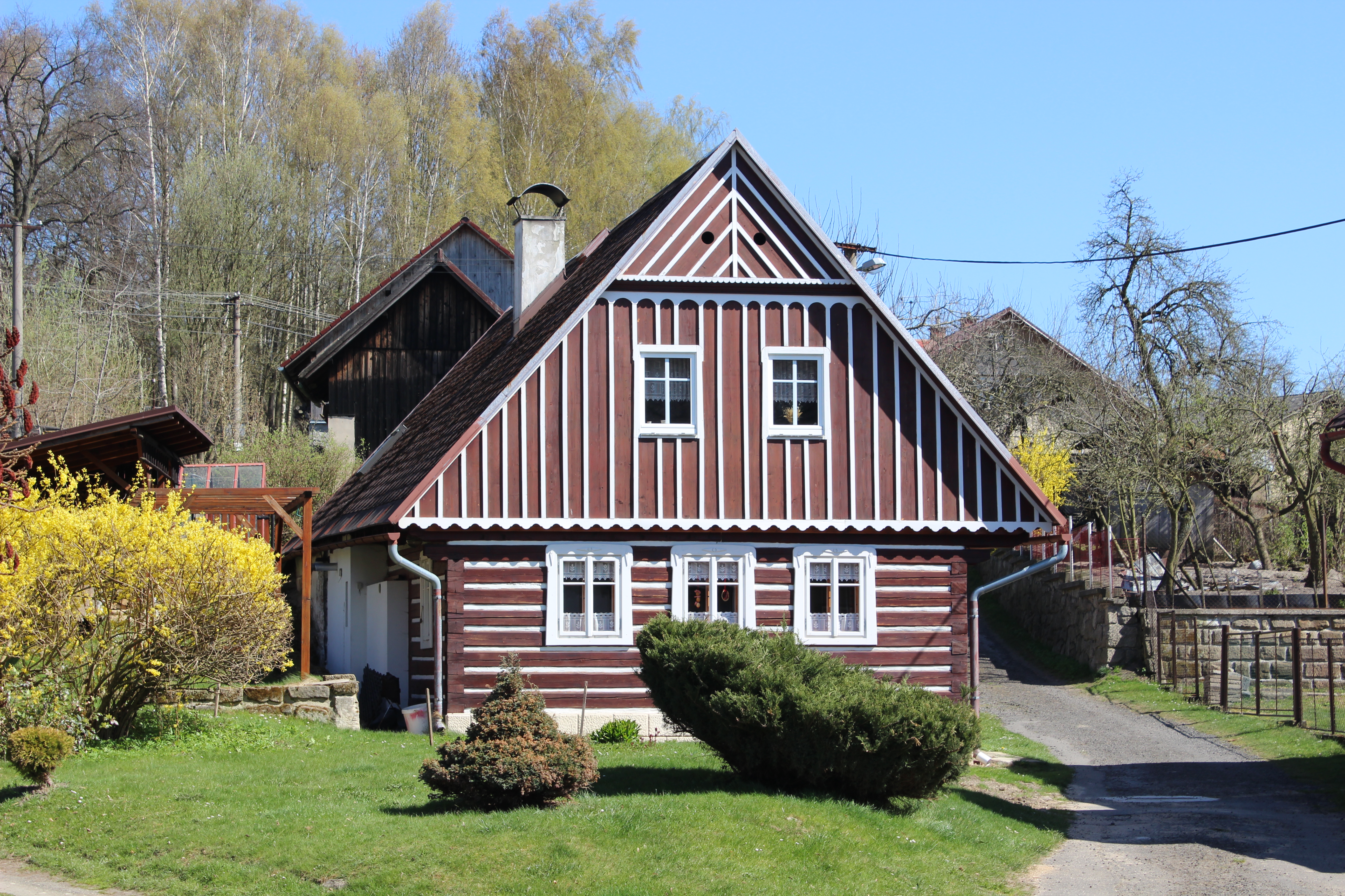 Dům číslo popisné 11 v Loučkách v okrese Semily.